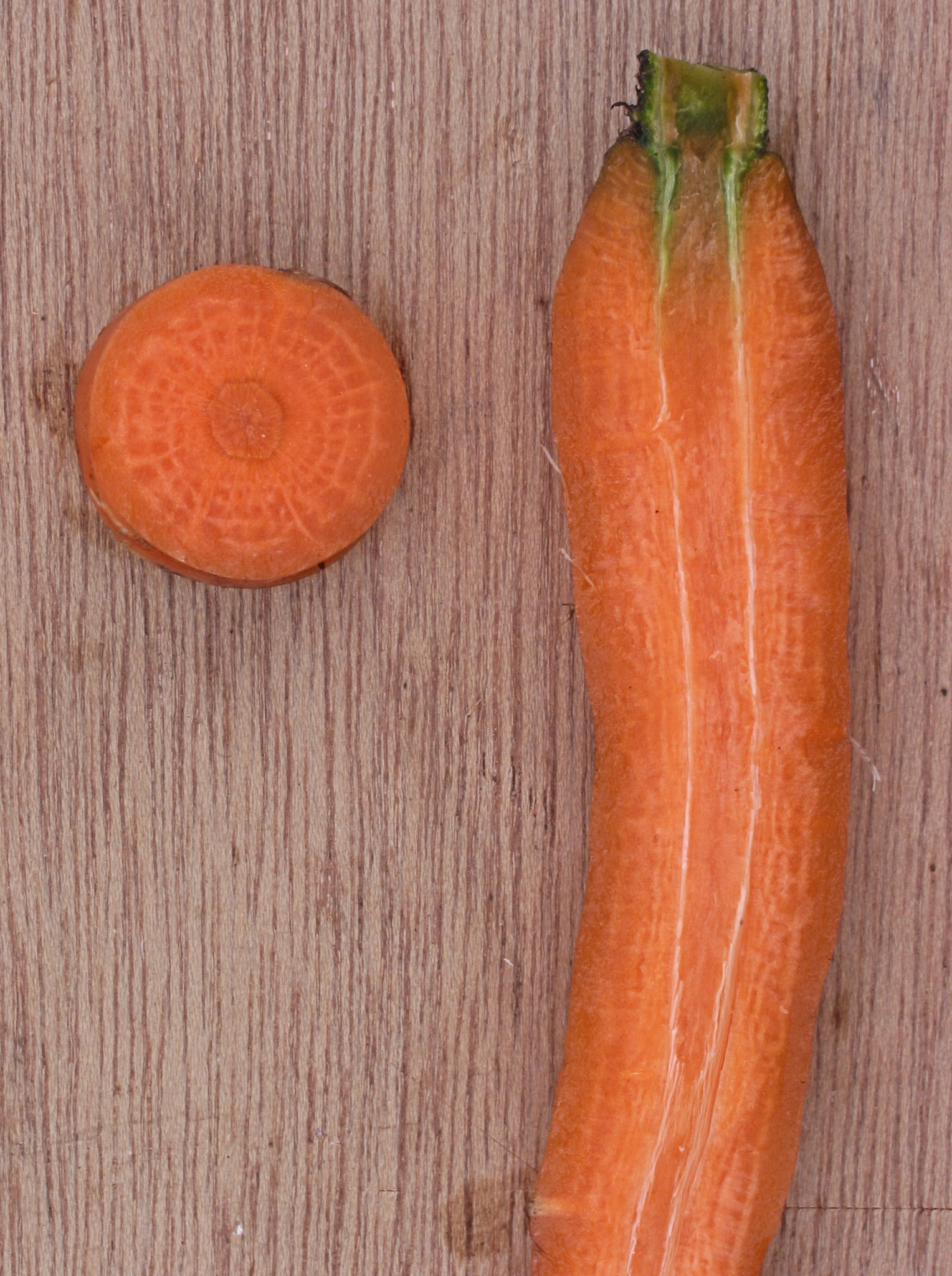 Doorsneden wortel Daucus carota